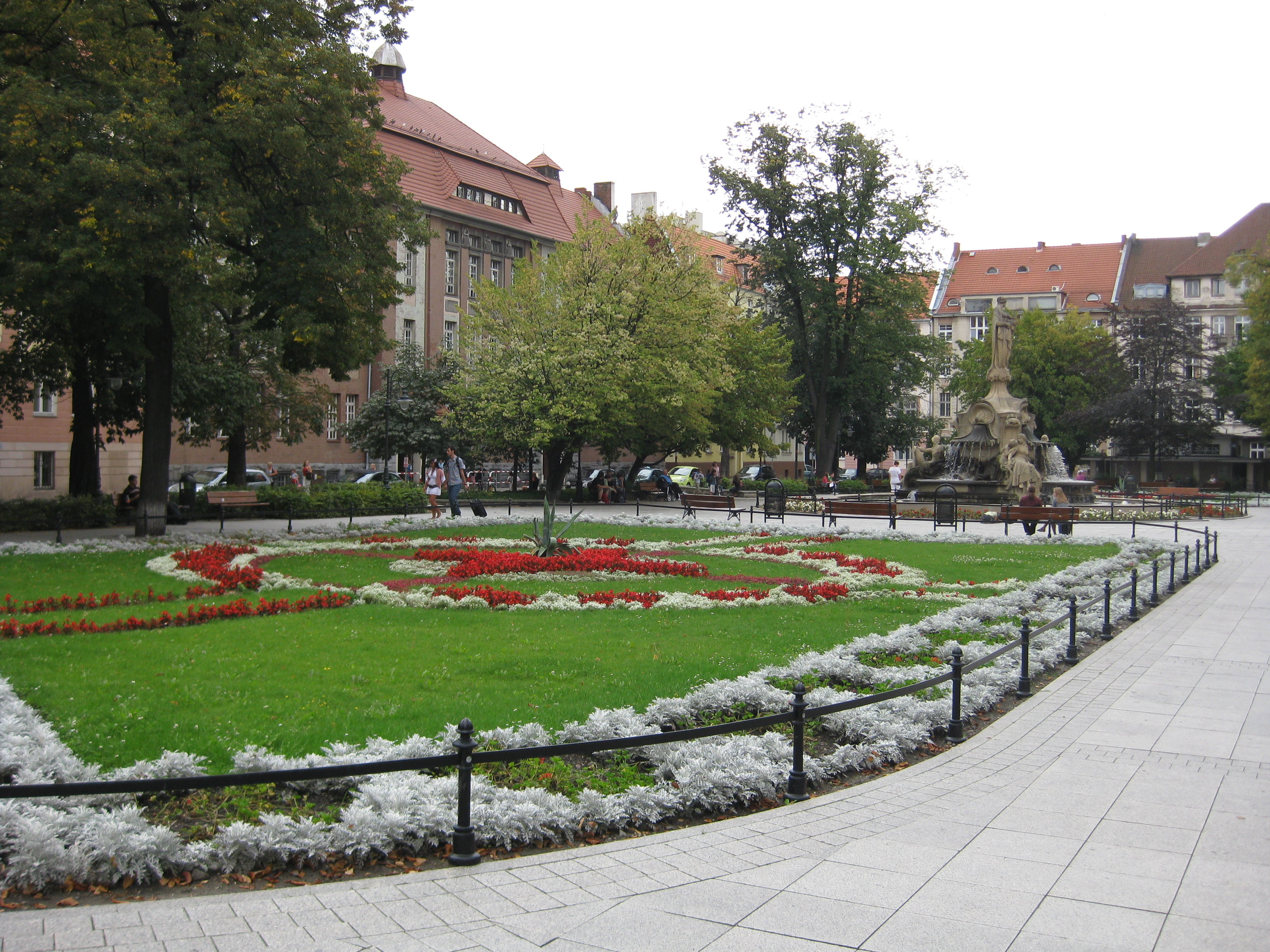 Ceres Brunnen